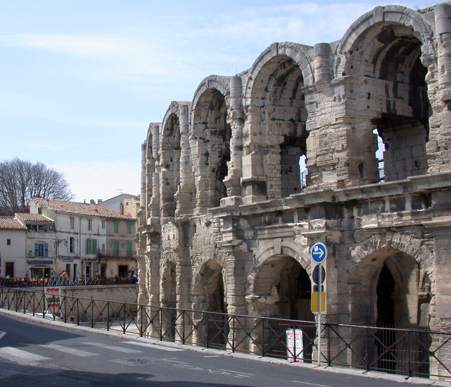 Arles (Francia), anfiteatro romano. Foto personale aprile 2005